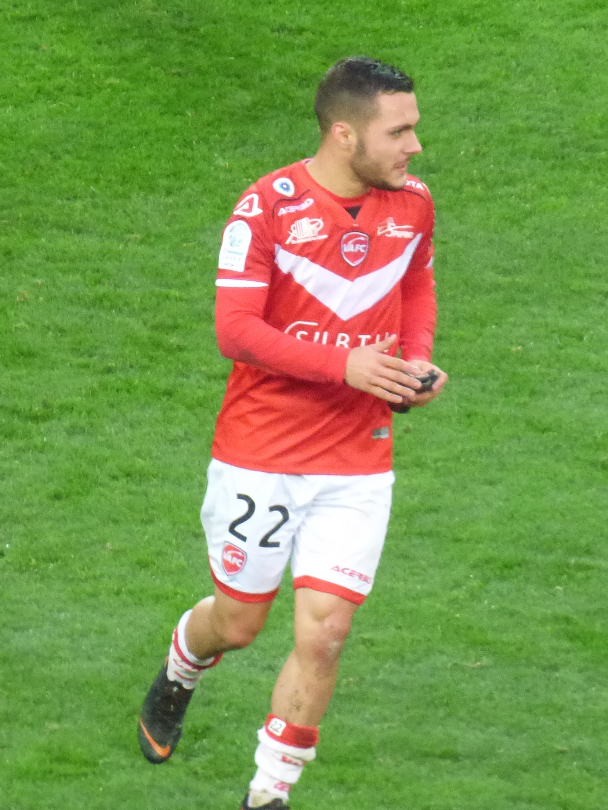 Tony Mauricio lors du match Valenciennes FC / RC Lens, comptant pour la quatorzième journée du championnat de France de Ligue 2 2018-2019, le 10 novembre 2018, au Stade du Hainaut.